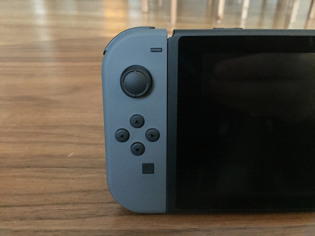 Un Joy-con gauche gris